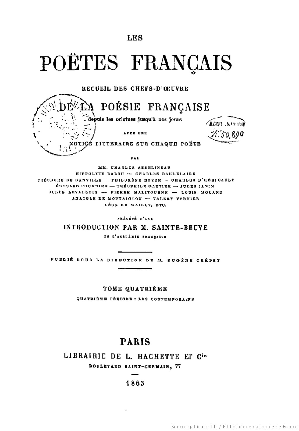 Recueil de poésies des poètes français d'Eugène Crépet. (1863)